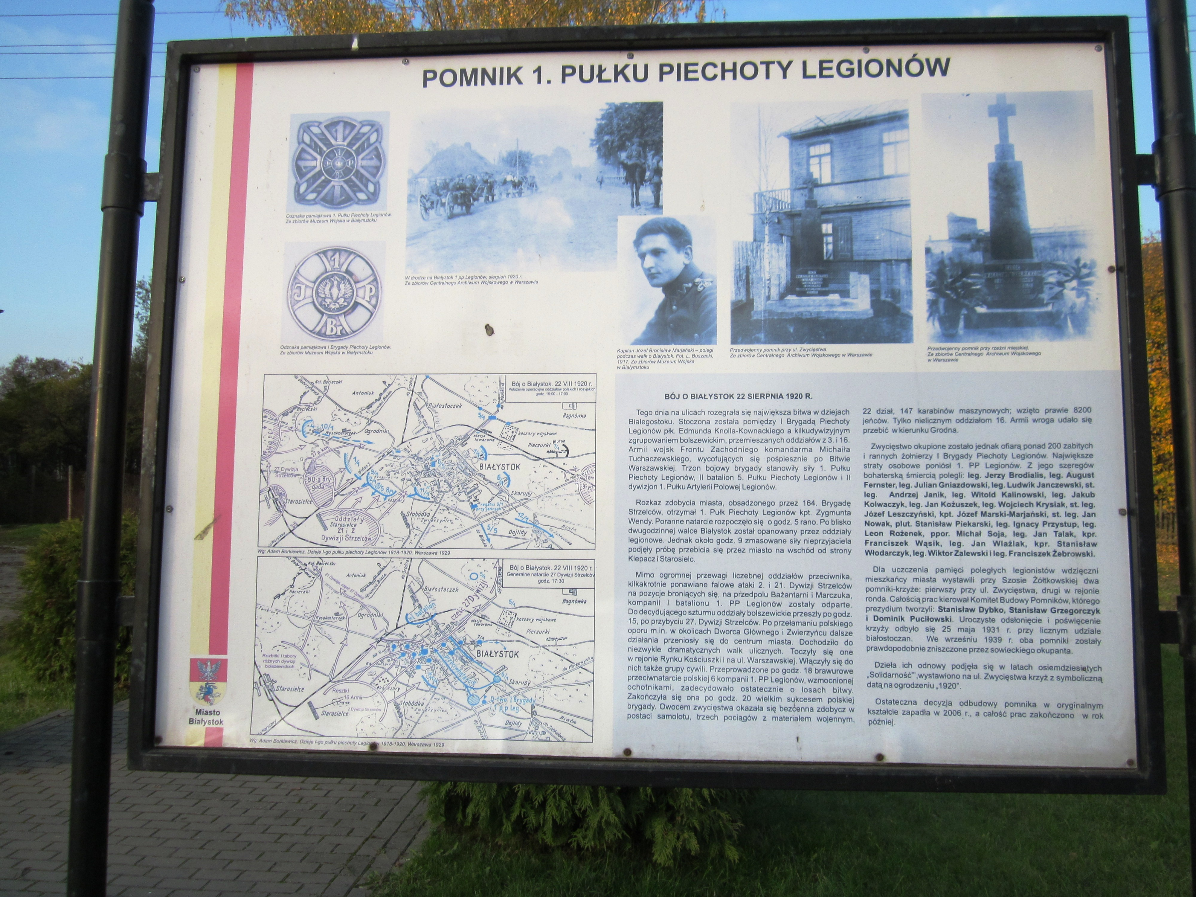 Tablica informacyjna o pomniku poświęconemu poległym legionistom 1. Pułku Piechoty w czasie bitwy białostockiej w 1920r. przy ul. Zwycięstwa 20/22